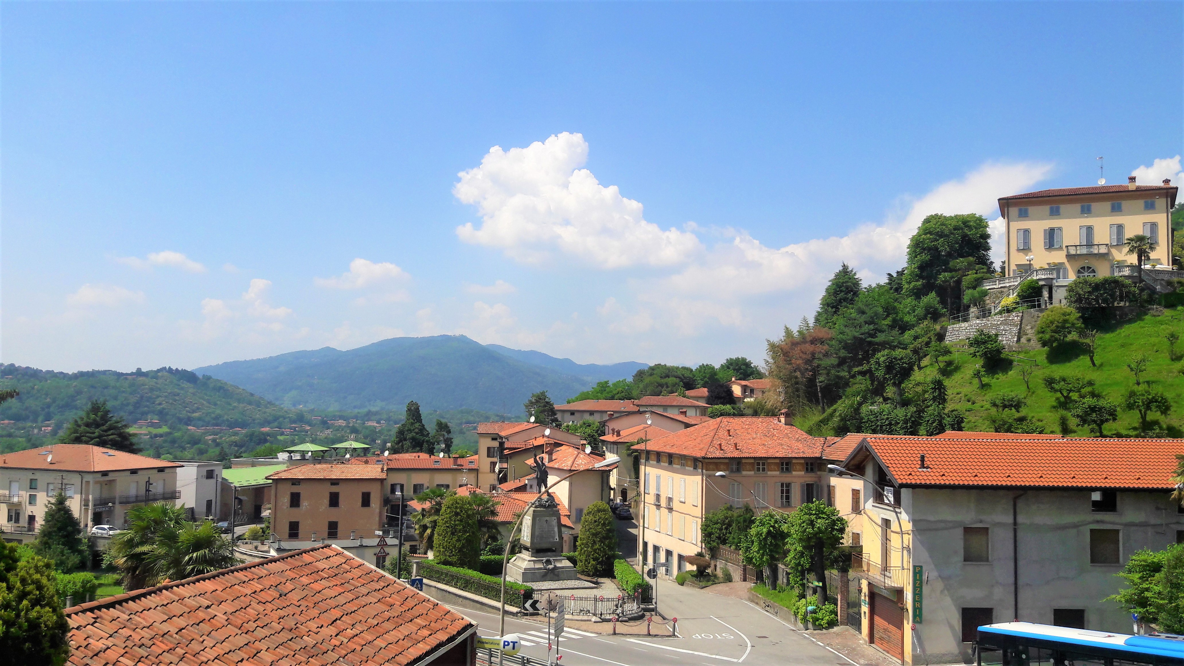 Il centro visto dal sagrato della chiesa parrocchiale di Villa d'Adda